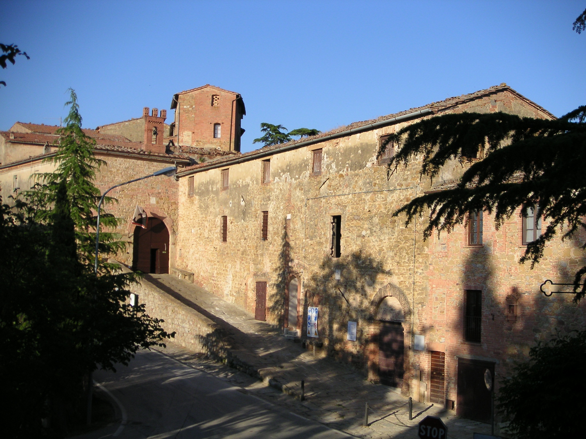 Veduta esterna della Grancia di Santa Maria della Scala, Montisi, provincia di Siena. Mentre al centro si vede l'ingresso principale all'ex fattoria fortificata, a destra c'è il fabbricato che ospita il Teatro di Montisi che, nel 2004, era ancora in fase di restauro.